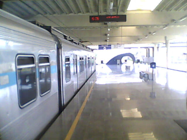 Estação Tancredo Neves